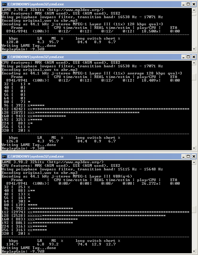 Comparació de resultats de diferents codificacions d'un fitxer wav a mp3, en CBR, ABR i VBR respectivament. Es mostra la taxa mitja i altres dades d'interès.